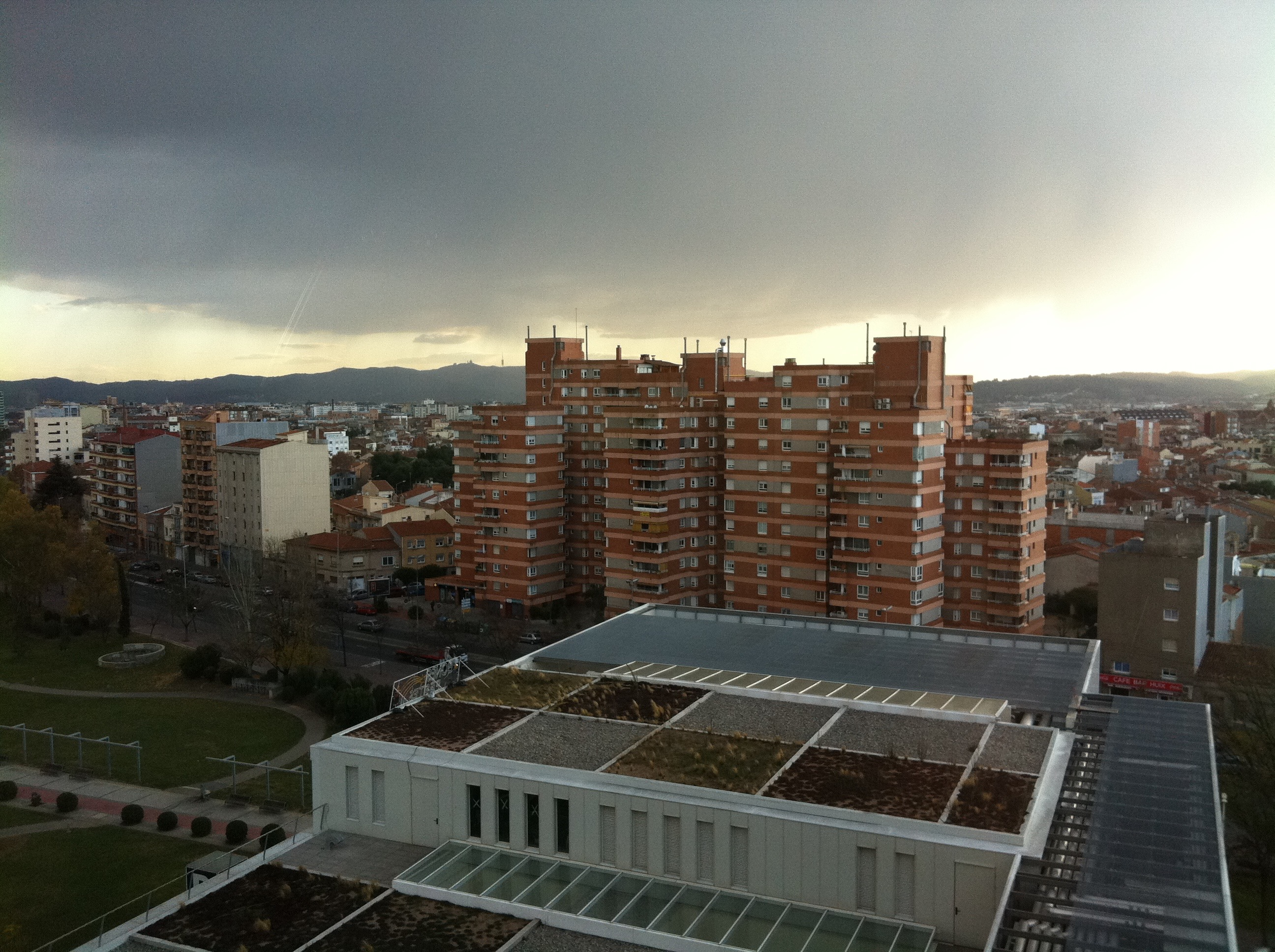 Sabadell vist des del Parc del Taulí